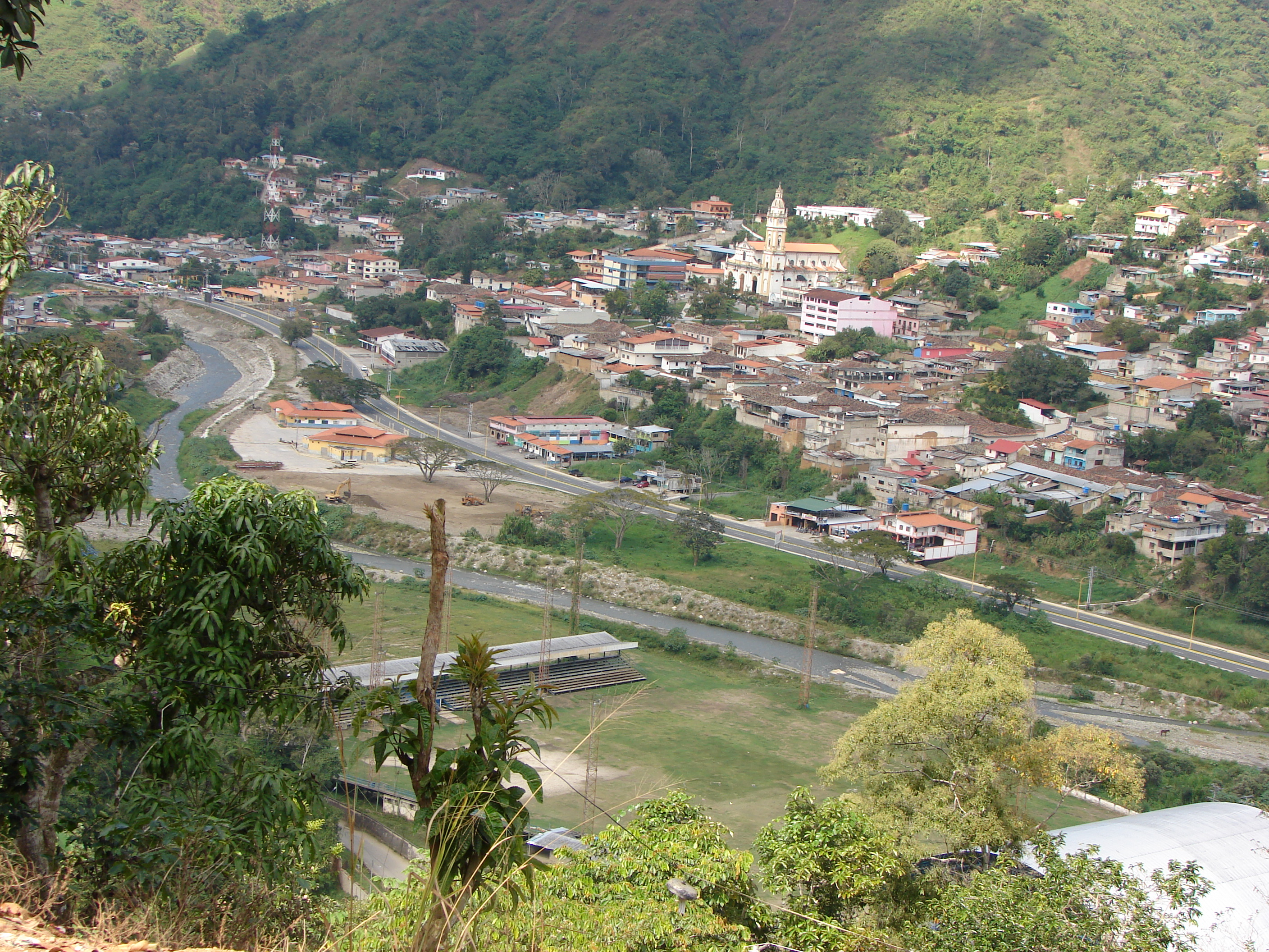 Vista panorámica de Santa Cruz de Mora